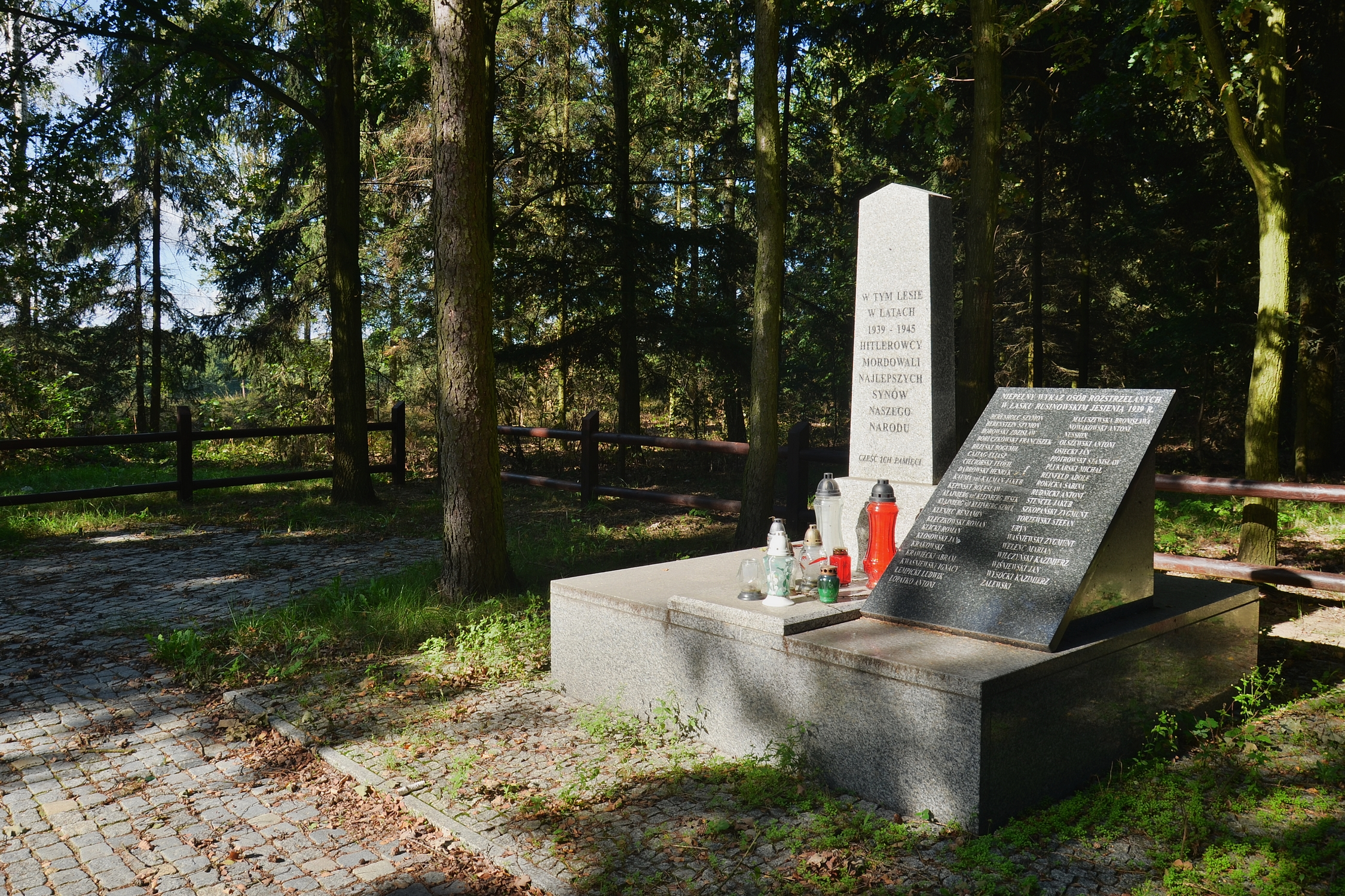 Pomnik ofiar straconych przez hitlerowców w latach 1939-1945